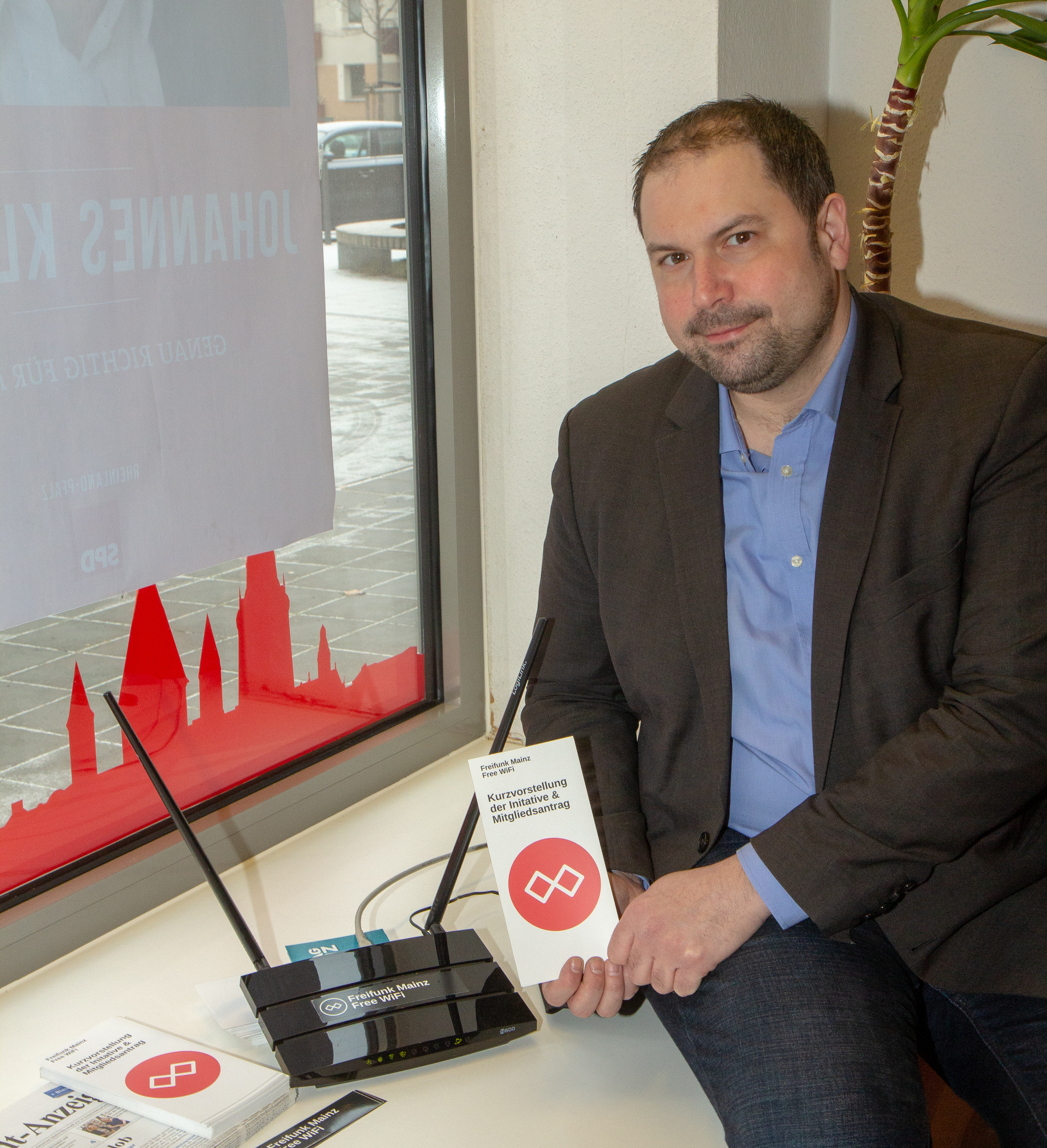 Johannes Klomann in seinem Wahlkreisbüro in Mainz.